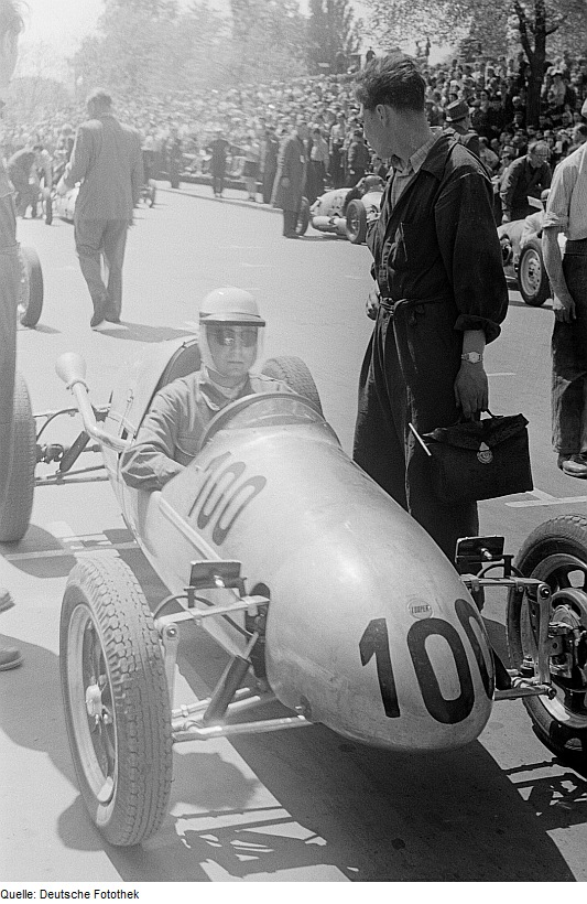 Original image description from the Deutsche Fotothek Portrait eines Automobilrennfahrers in seinem Wagen mit der Nummer 100 vor dem Startschuß beim 6. Leipziger Stadtparkrennen Theo Helfrich waits on the start line in his Cooper-Norton MkVIII racing car, at the 6th Leipziger Stadtparkrennen (1954-05-16).